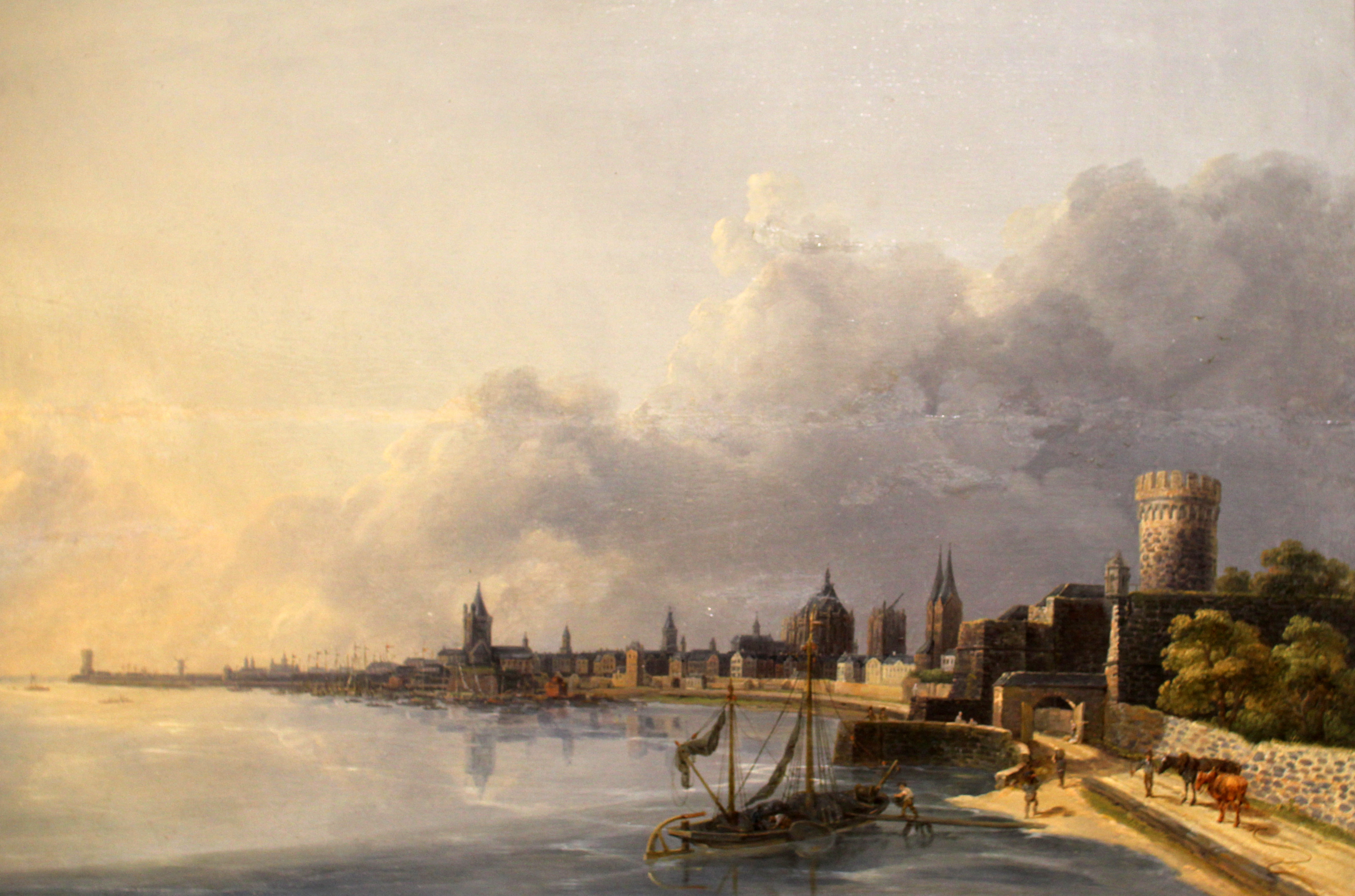 Franz Joseph Manskirsch um 1795. Kölner Rheinpanorama, Ansicht Köln und Deutz von Nordosten. Ölgemälde auf Holz 37,5 x 63 cm (Fotoausschnitt). Kölnisches Stadtmuseum, KSM Bestand 0464